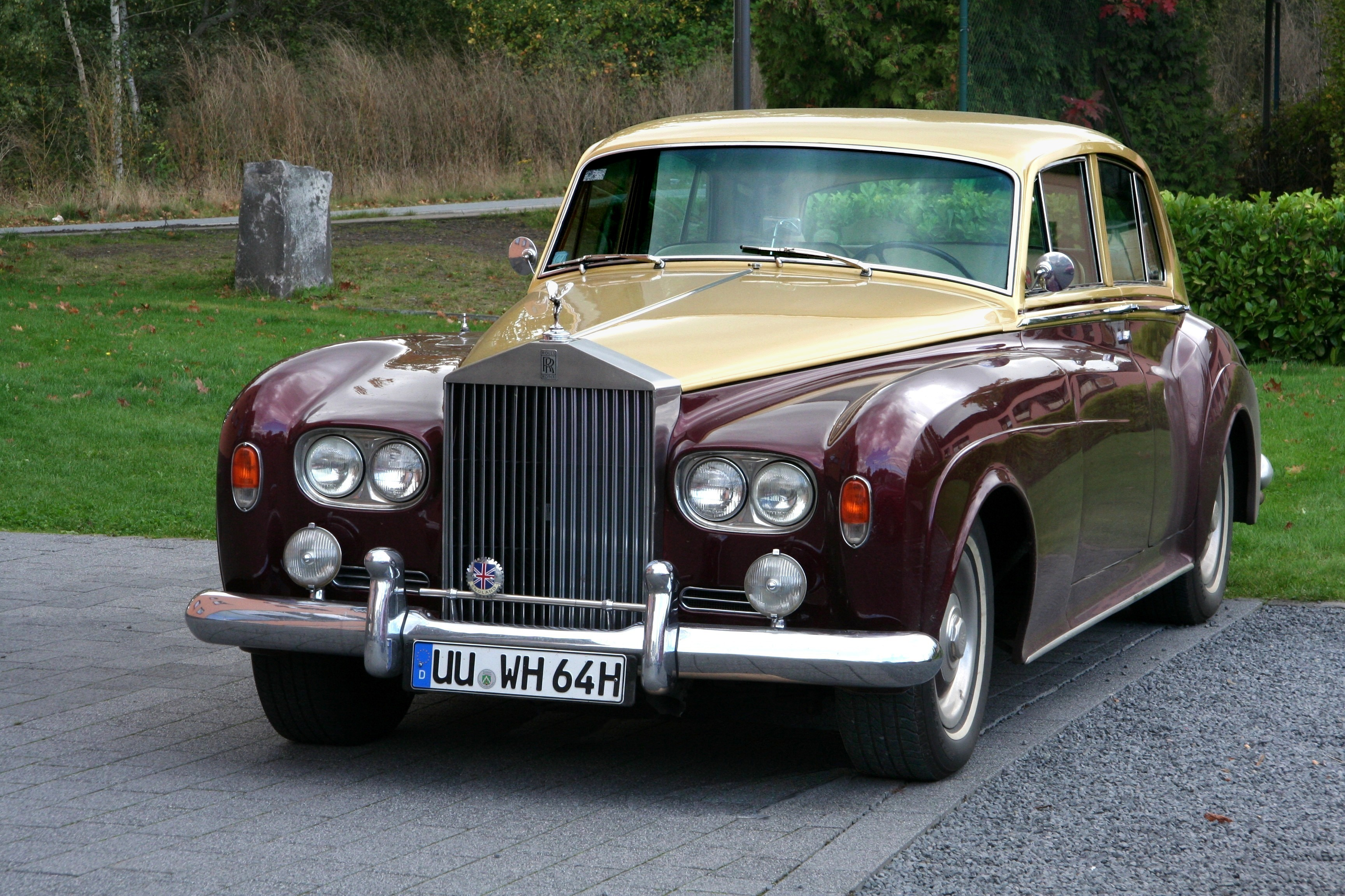 Rolls-Royce Silver Cloud III, Baujahr 1964 (Phantasiekennzeichen)